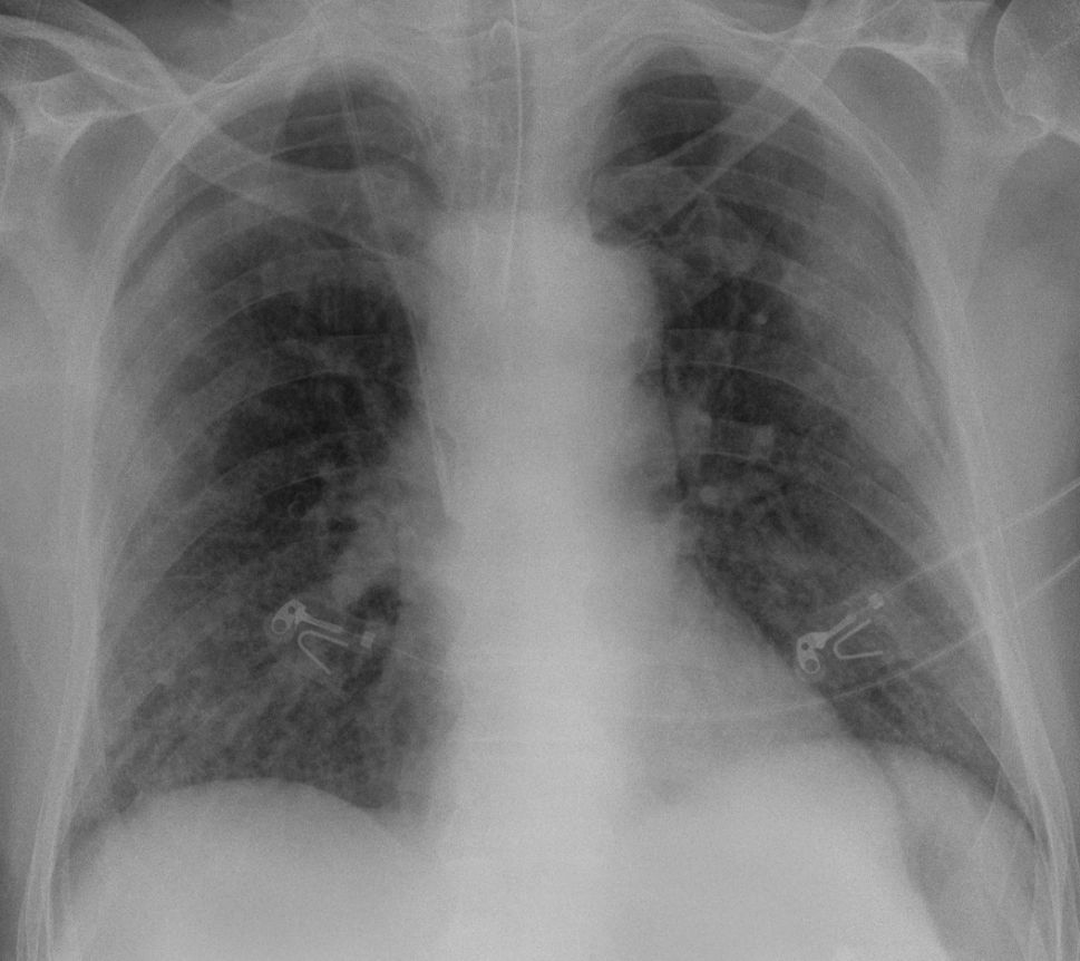 Röntgenbild (Bettlunge) einer COVID-19-Pneumonie. Zu diesem Fall sind auch CT-Bilder vorhanden. Siehe COVID-19 pneumonia - case 001.